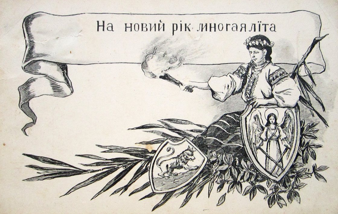 Карта кореспонденційна.